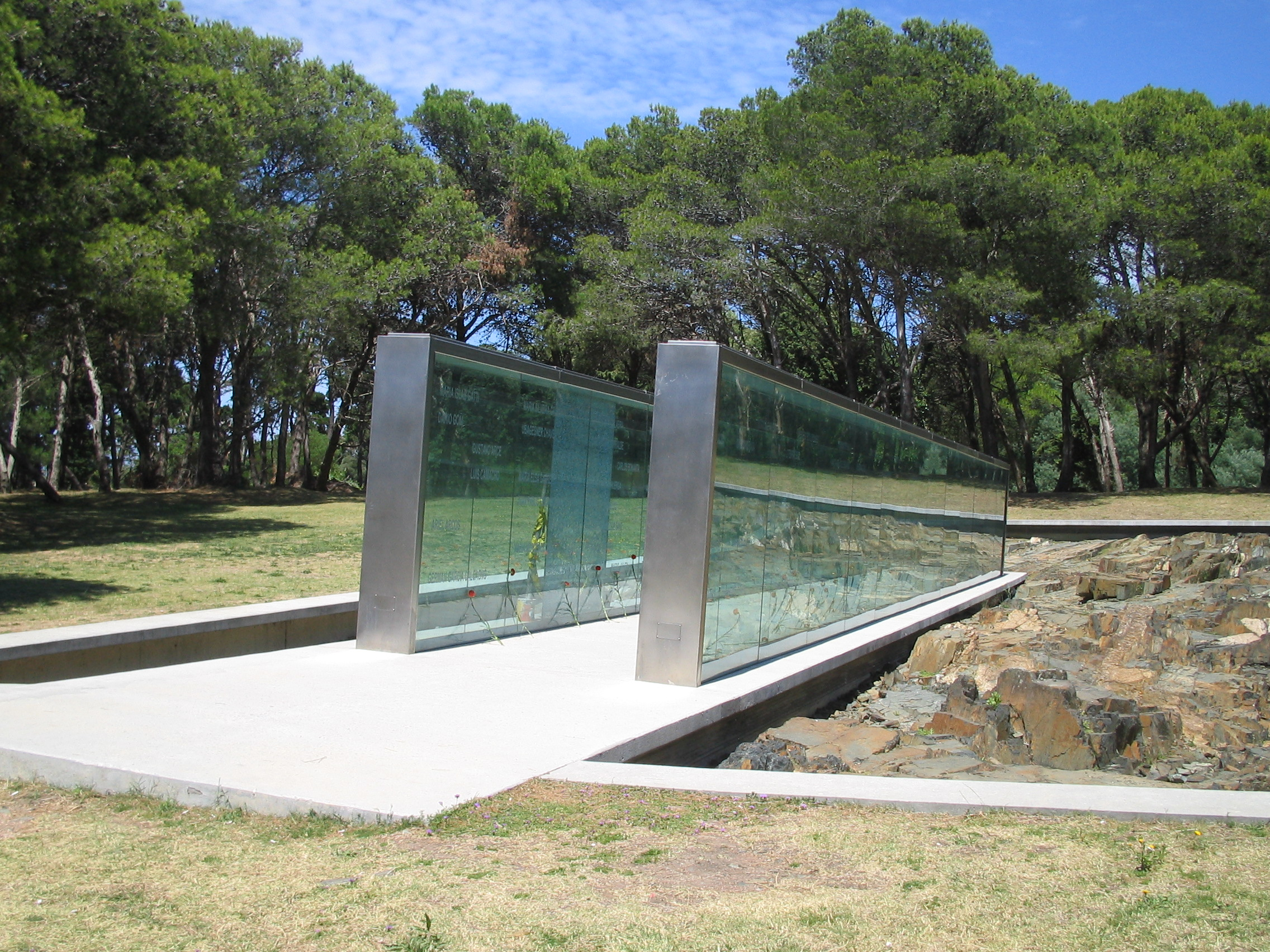 "Memorial en recordación de los detenidos desaparecidos", Parque Vaz Ferreira, Cerro, Montevideo. Autores Arq. Martha Kohen y Ruben Otero. Inaugurado el 10 de diciembre de 2001.